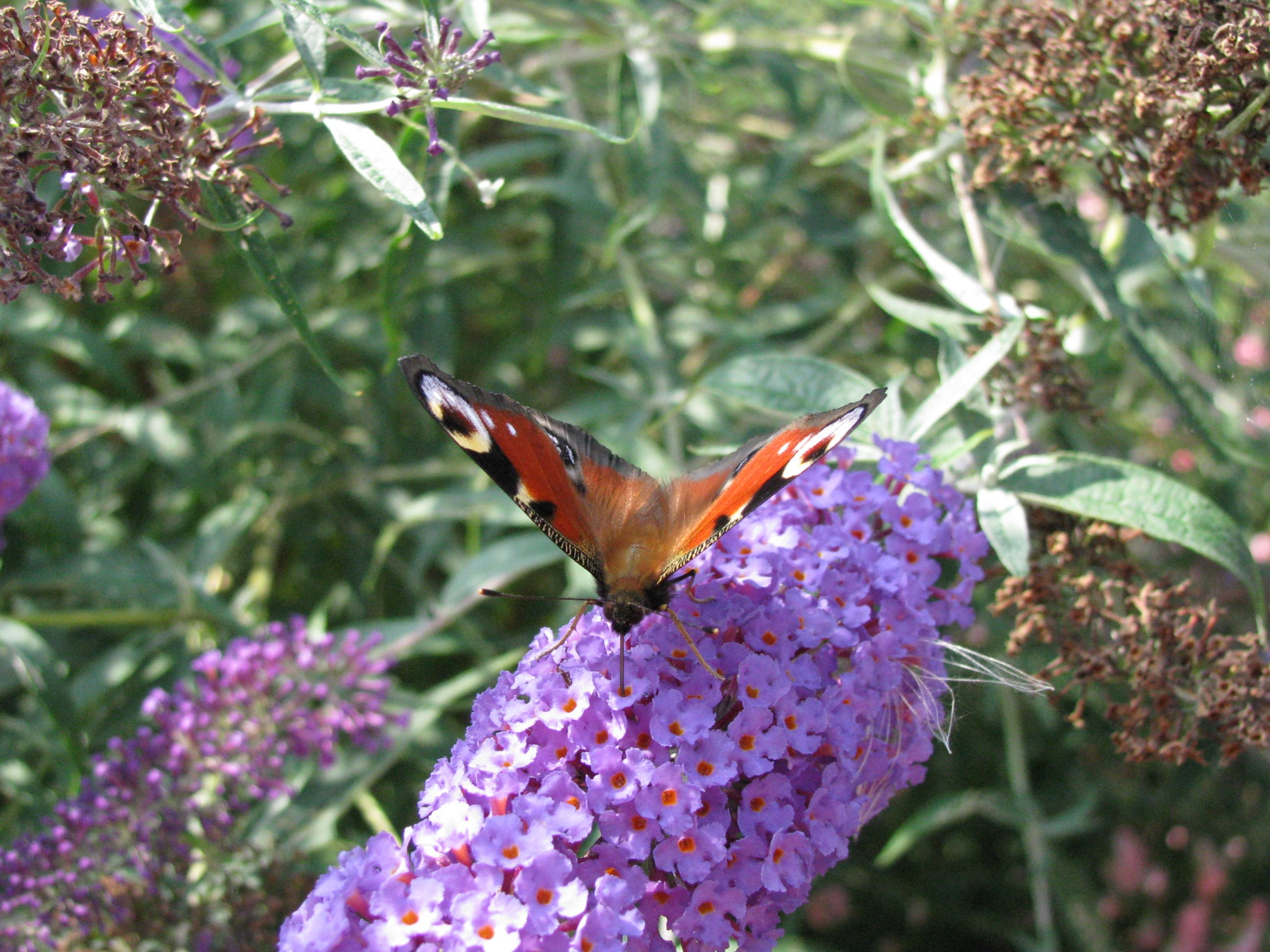 Pfauenauge, Schmetterling